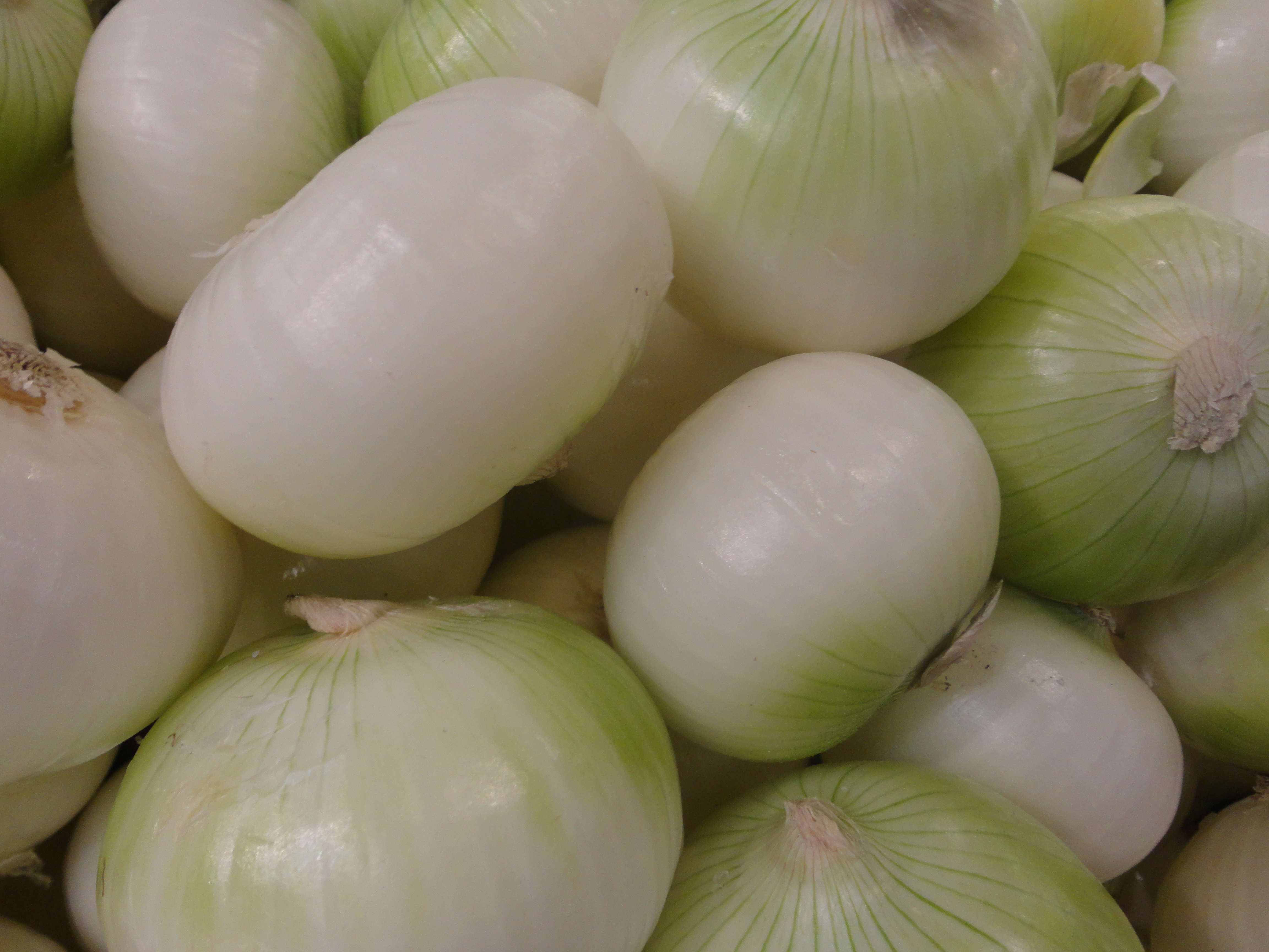 Cebolla Allium cepa Blanca